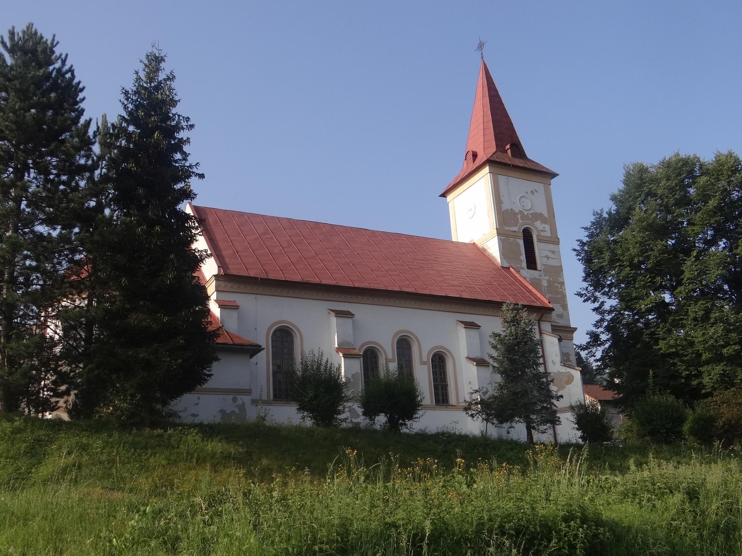 Spišská Nová Ves (kostol Novoveská Huta)